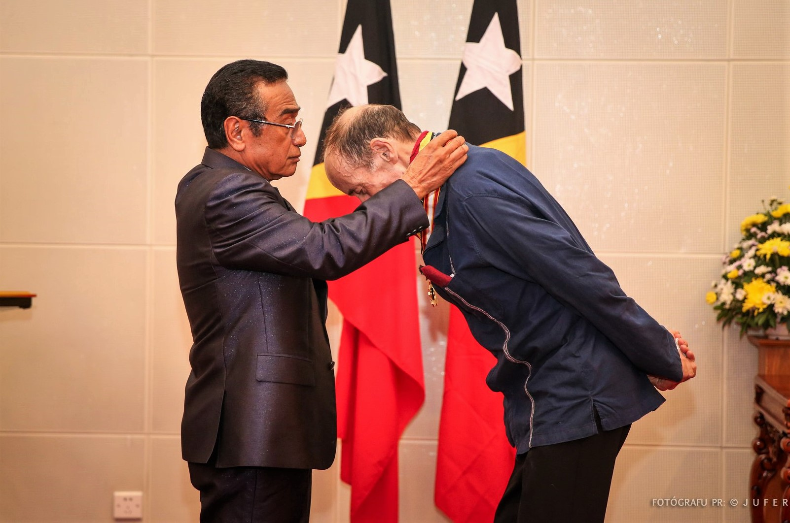 Christopher Wenner erhält von Francisco Guterres den Ordem de Timor-Leste